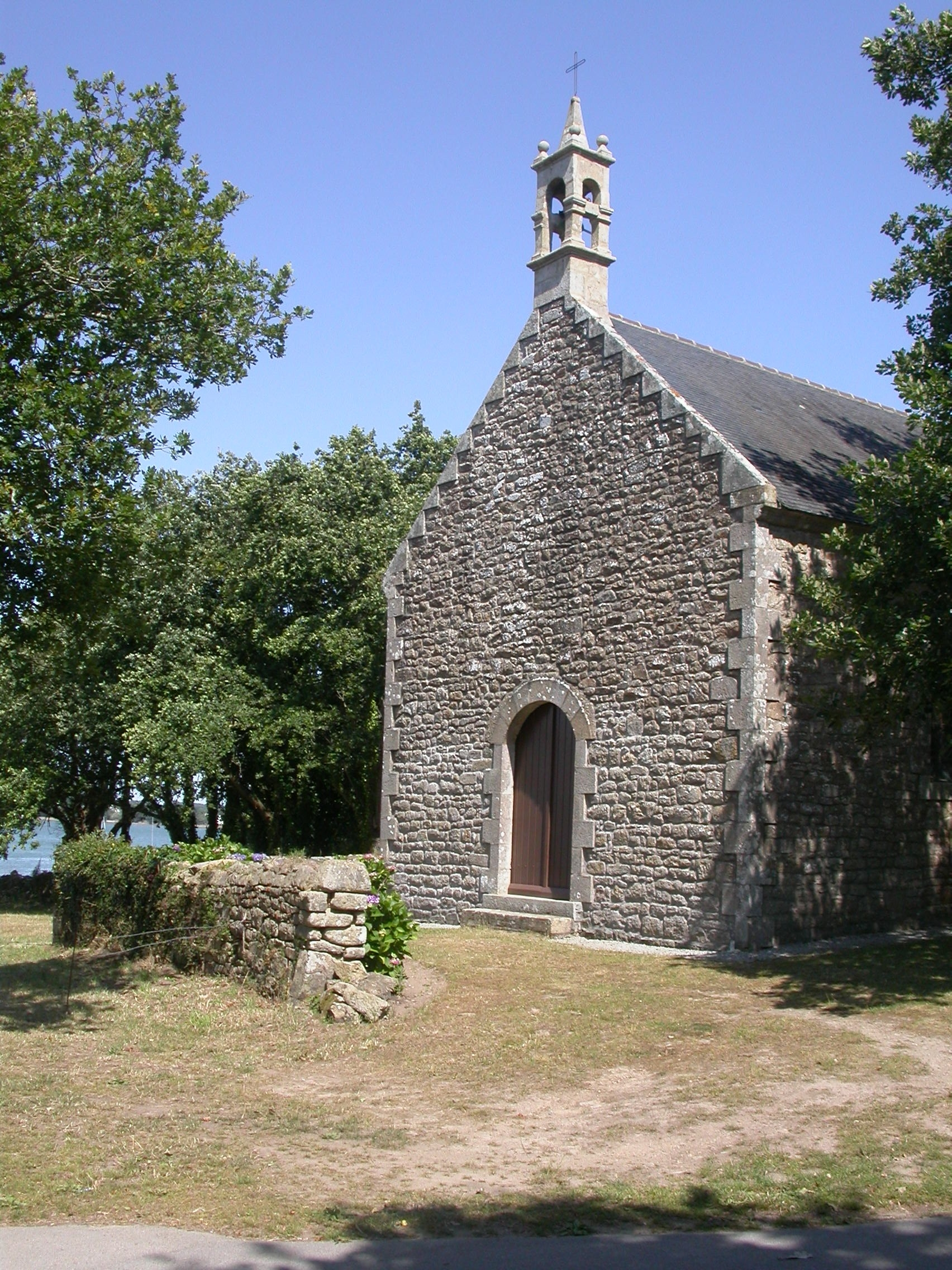 la chapelle du Moustoir à Locmariaquer